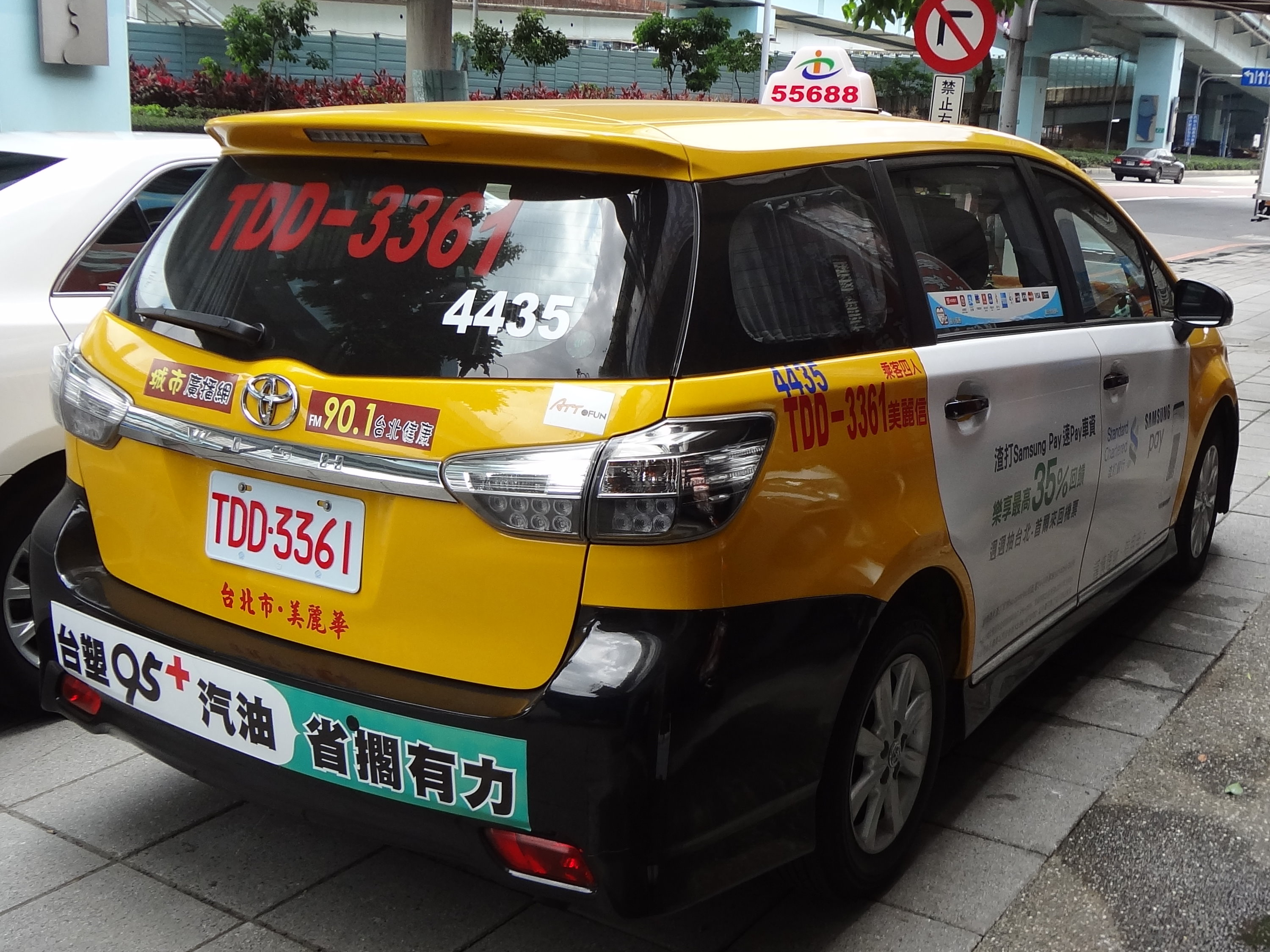 台灣大車隊豐田Wish計程車TDD-3361，右側貼渣打國際商業銀行Samsung Pay廣告，車尾貼台塑石化「台塑95⁺無鉛汽油」廣告。